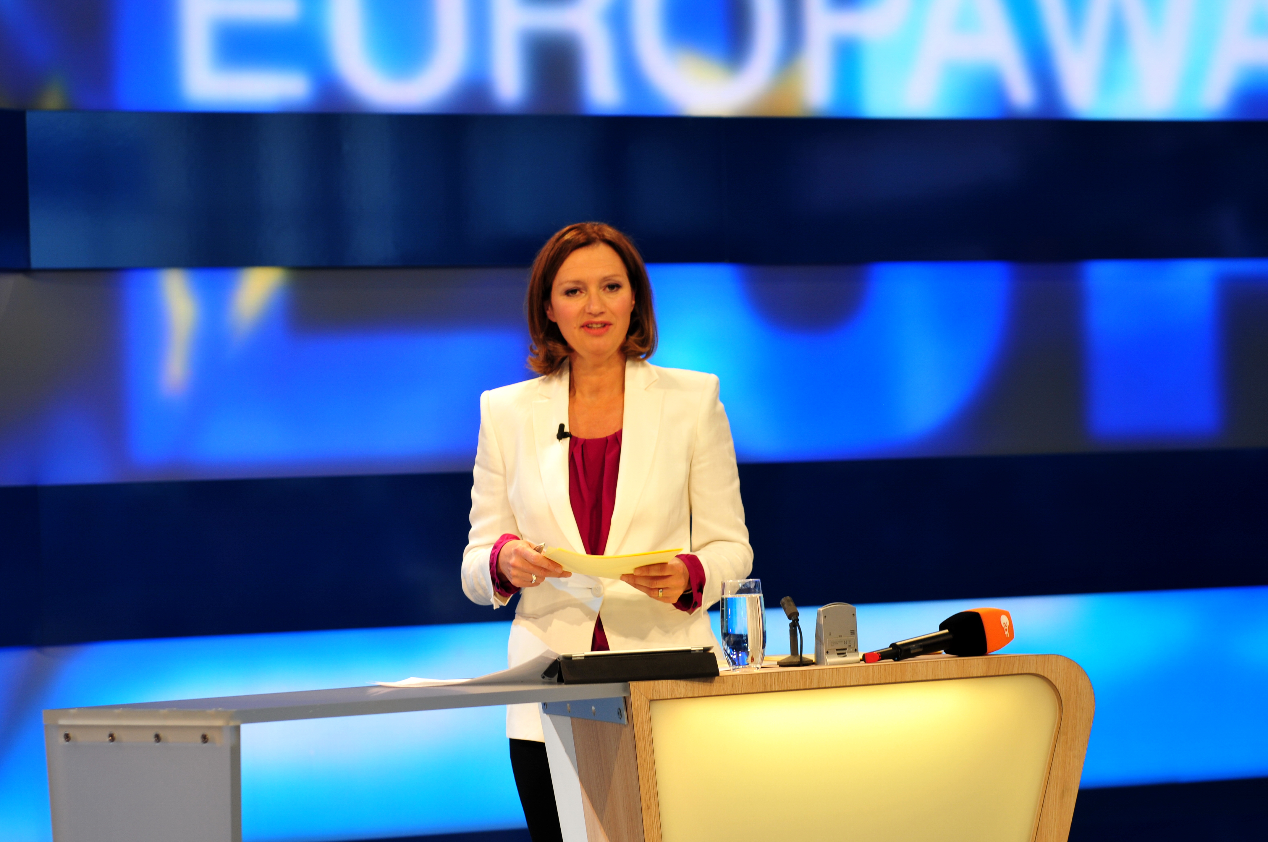 Europawahl 2014; Wahlstudio ZDF